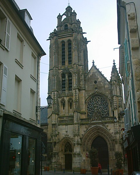 Cathédrale Saint Maclou, Pontoise on 03/03/06.